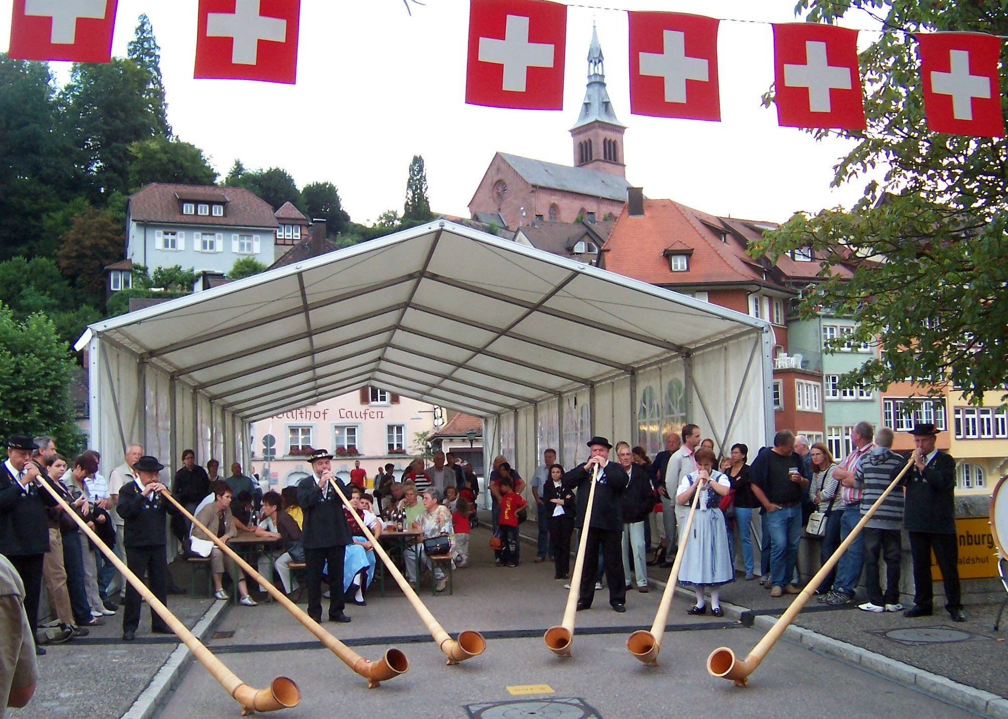 „Alphorngruppe Magden“/CH an der grenzüberschreitenden 1.August-Feier auf der Alten Rheinbrücke von Laufenburg in Aargau/CH und Baden-Württemberg/D. Im Hintergrund ist der Deutsche Stadtteil sichtbar.